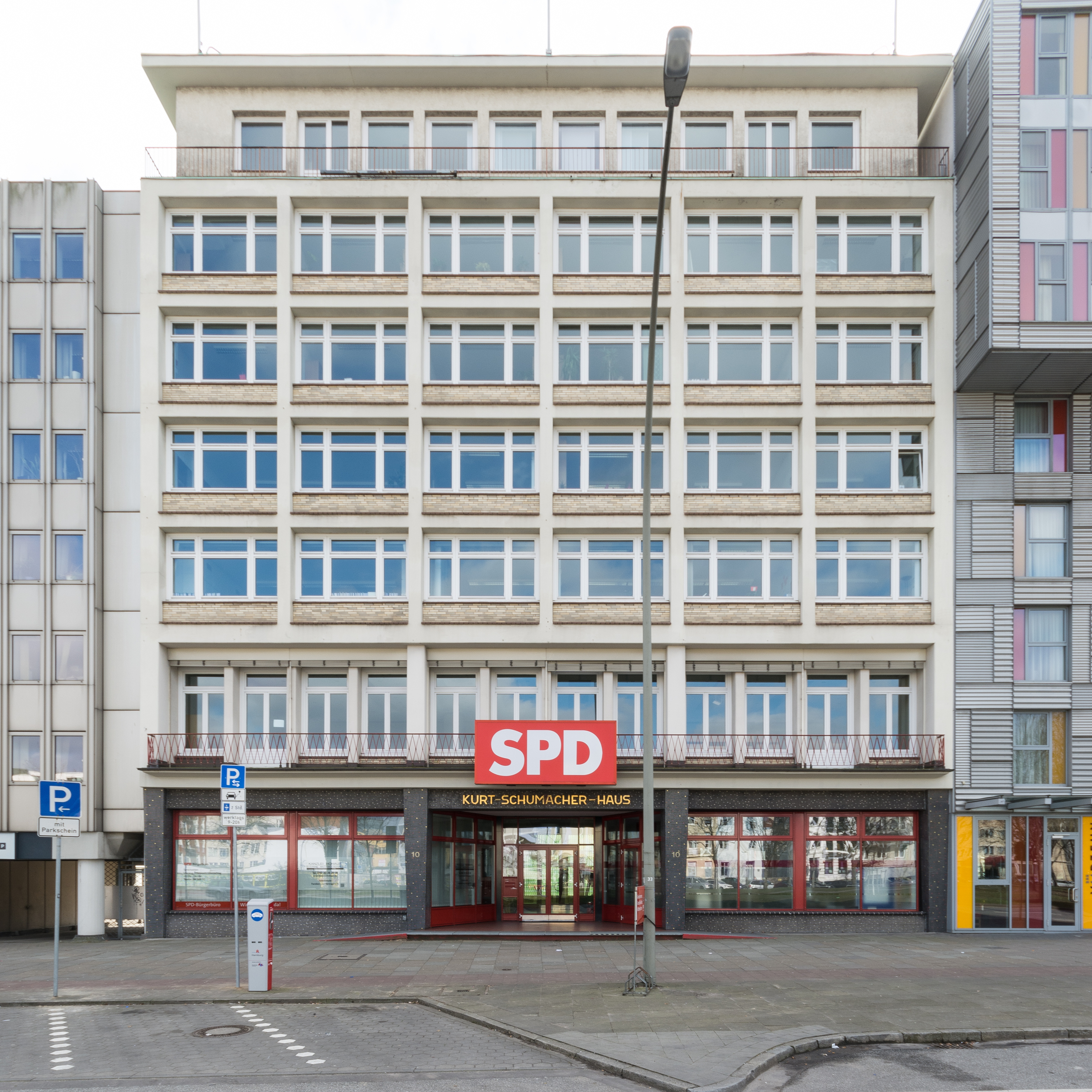 Kurt-Schumacher-Haus in Hamburg-St. Georg. This is a photograph of an architectural monument.